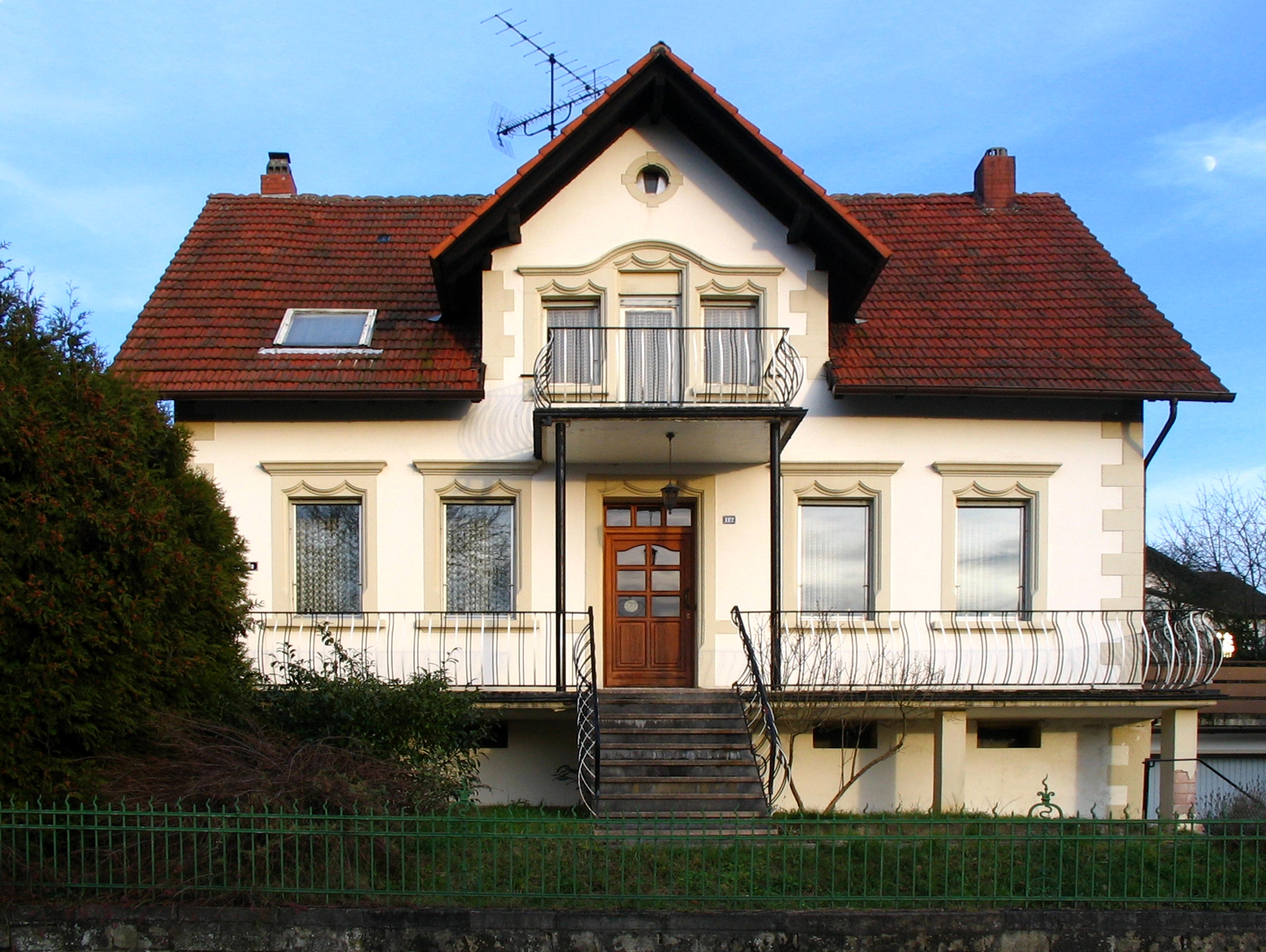 Haus des Musikanten Alex Jung in Essweiler, ein typisches Musikantenhaus mit einem Musikantengiebel.